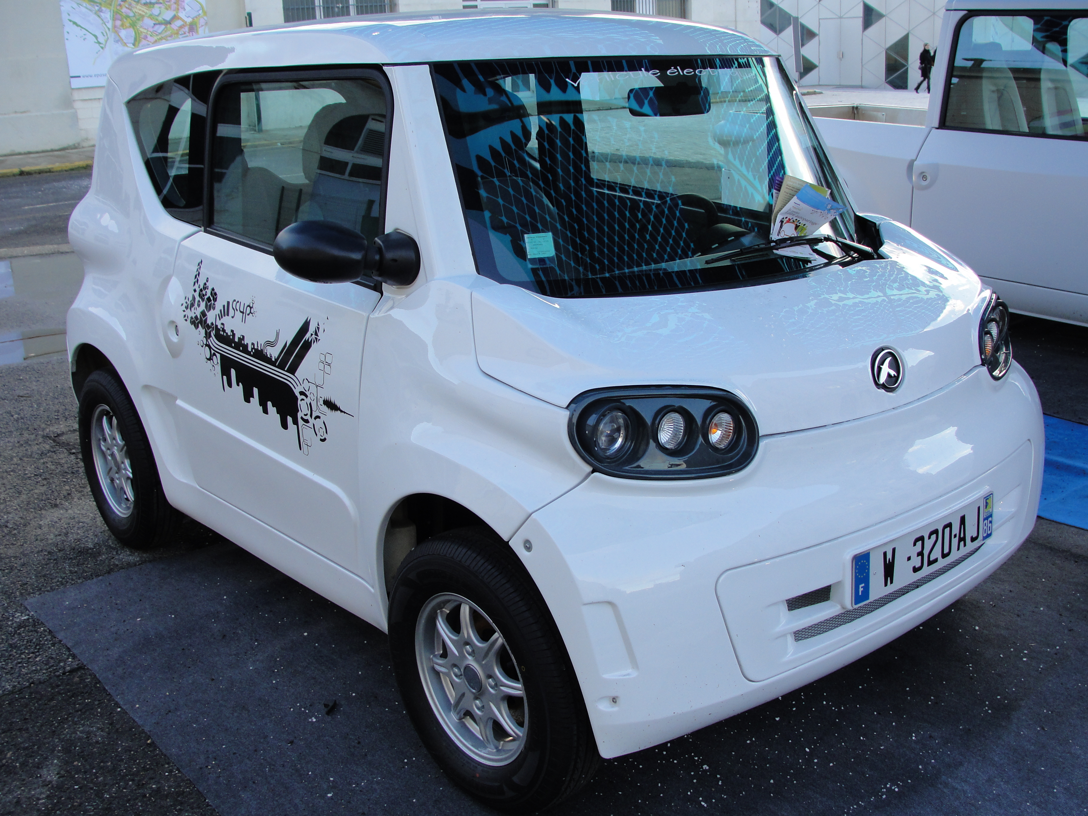 Le véhicule électrique SimpliCity, originaire de Poitou-Charentes, présenté en 2009 et mis en production l'année suivante, sur les chaînes Heuliez de Cerizay (79). Proposé dans un 1er temps aux collectivités, l'objectif est par la suite de le diffuser auprès des particuliers. -2/2